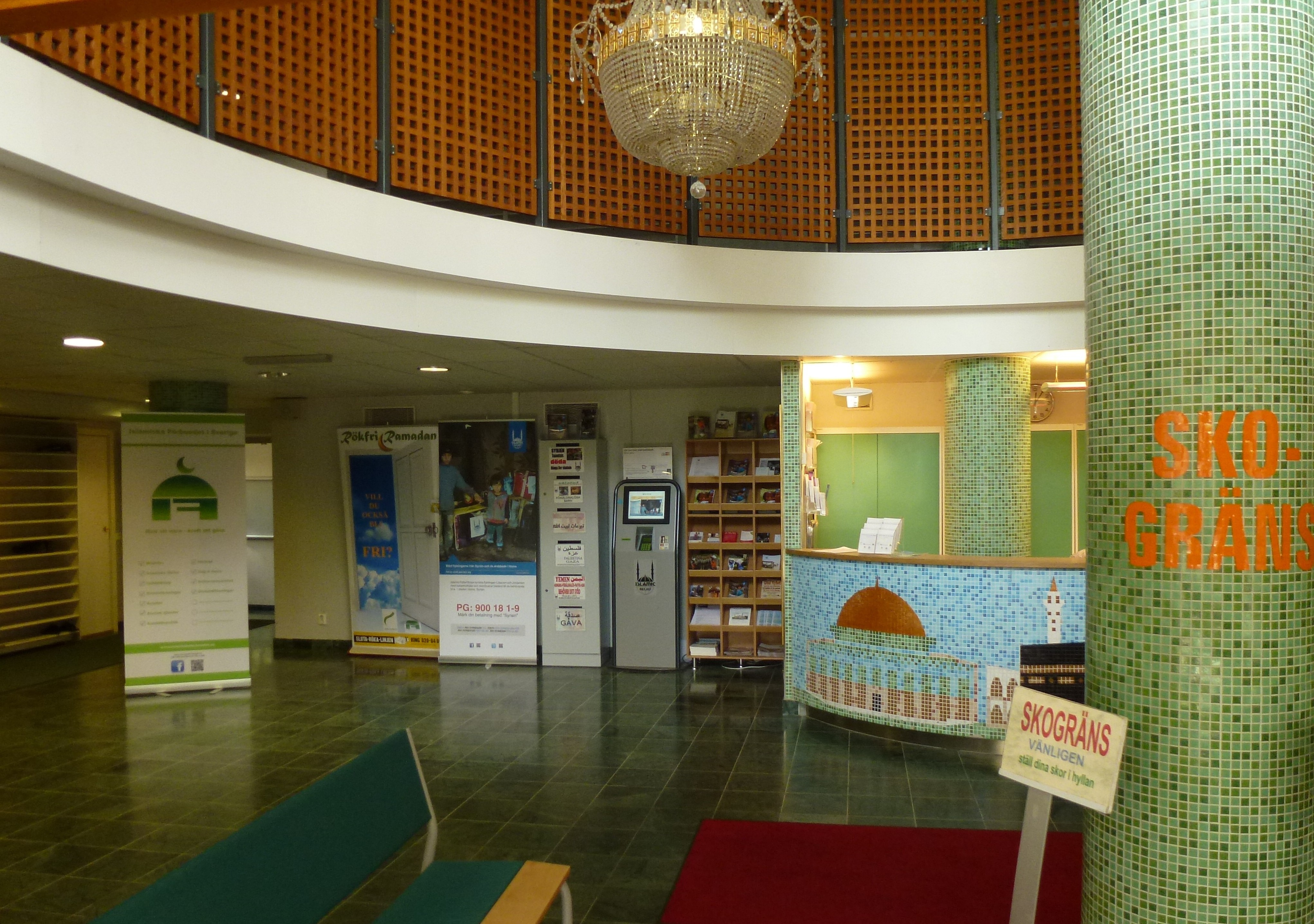 Stockholms moské entréhall